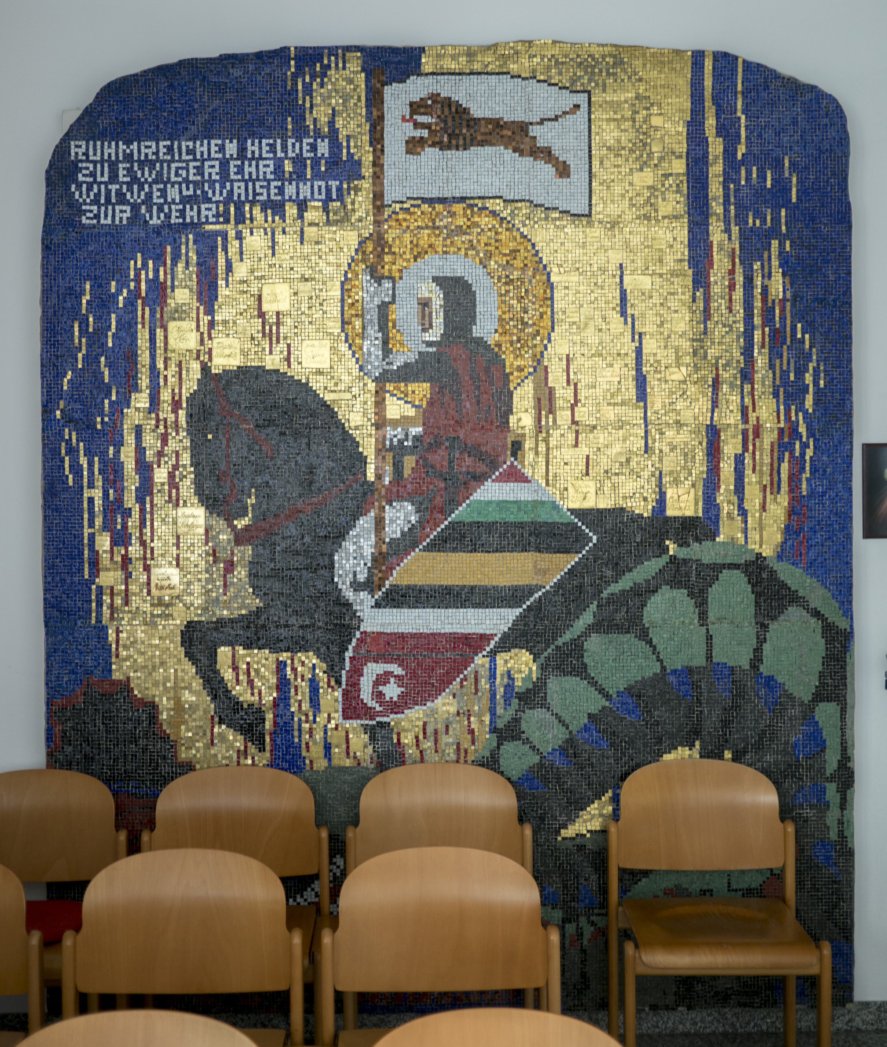 Stockerau Krankenhauskapelle Mosaik, laut der Heilige Georg, zuvor am Turm der Stadtkirche angebraucht.